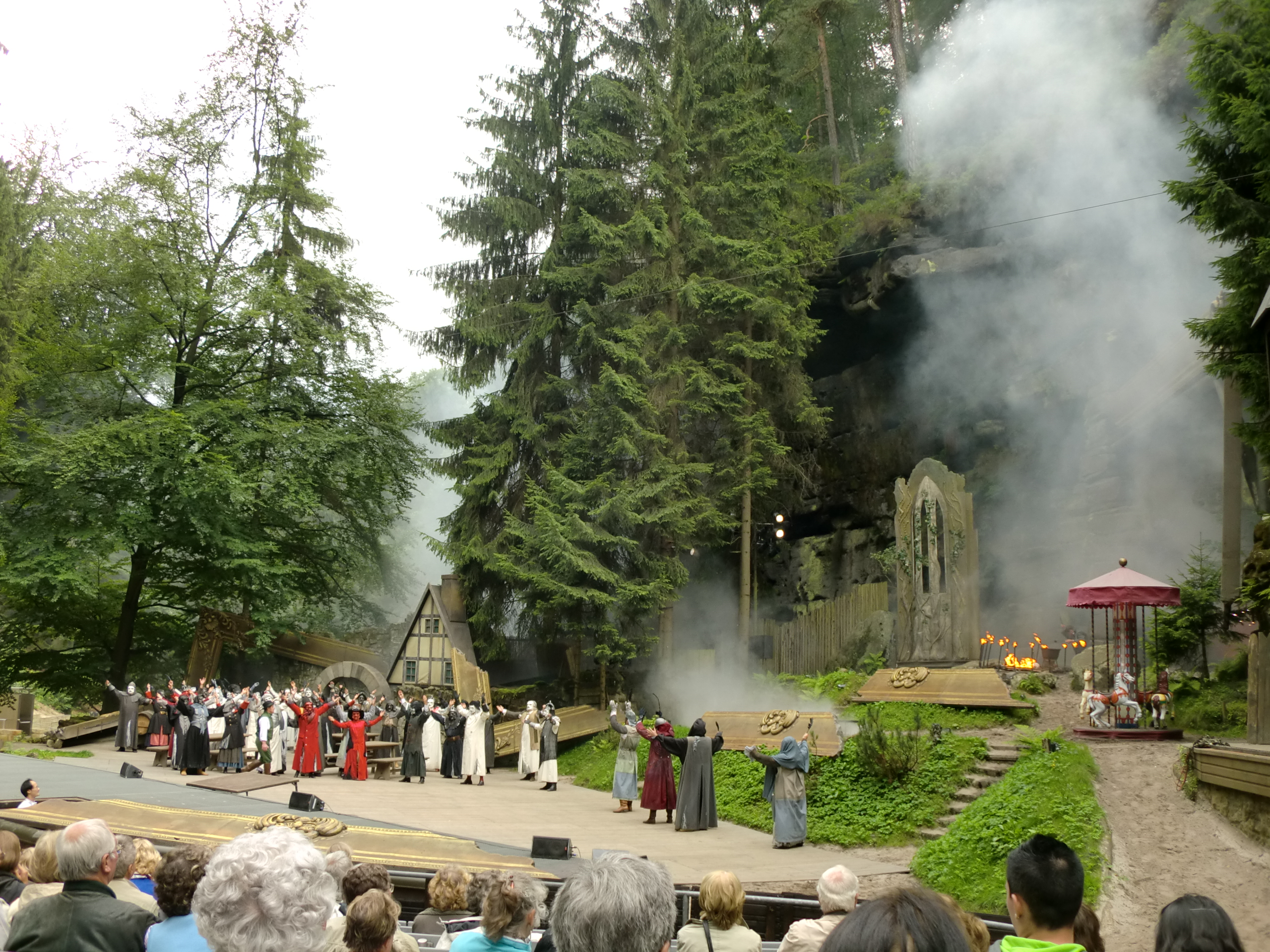 Felsenbühne Rathen, Vorstellung: Freischütz